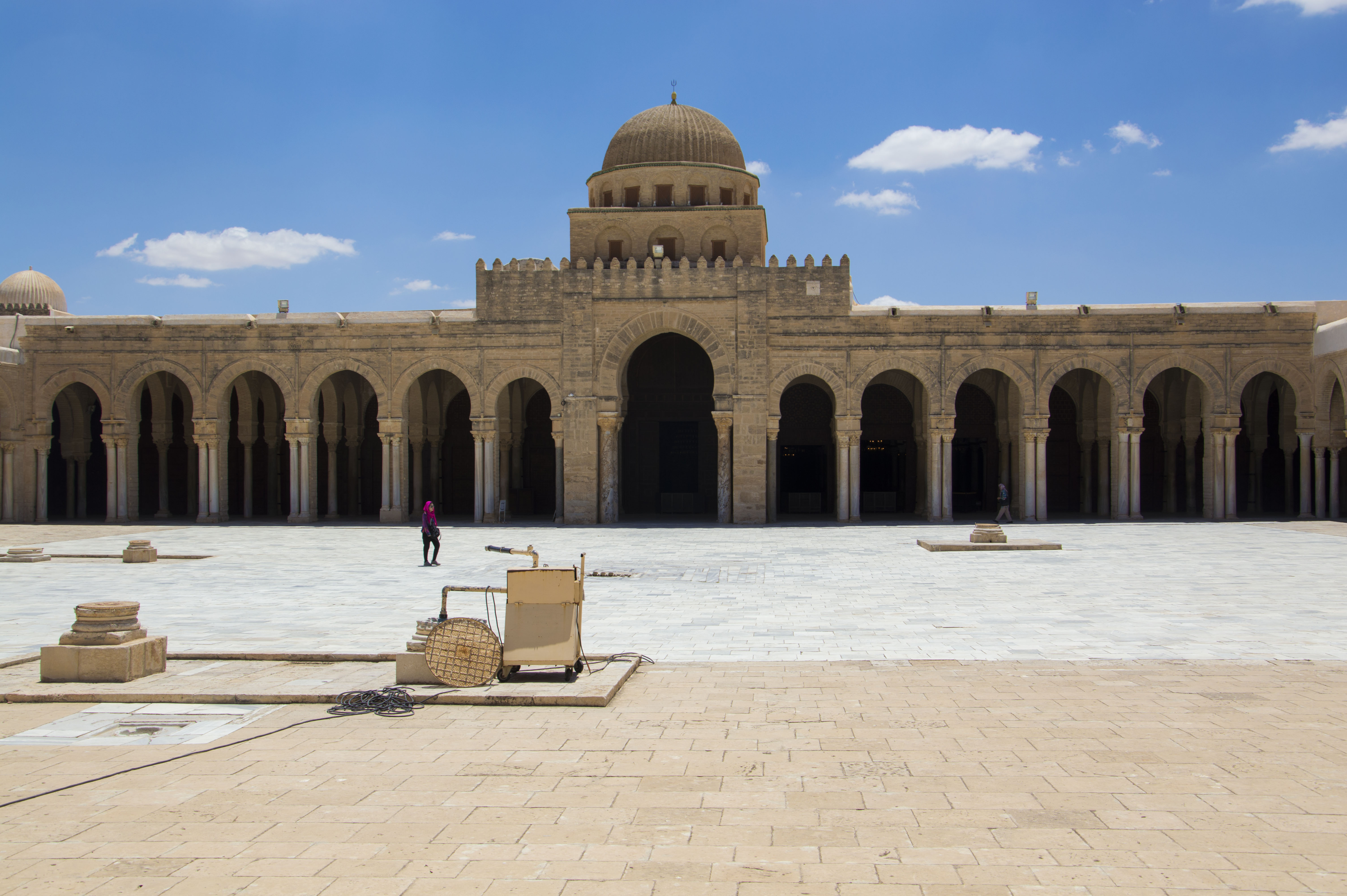 Vue d'ensemble de la façade du portique bordant le côté sud de la cour dans la Grande Mosquée de Kairouan, en Tunisie. Ce portique (ou galerie narthex), ouvert par treize arcades, se trouve devant la salle de prière.